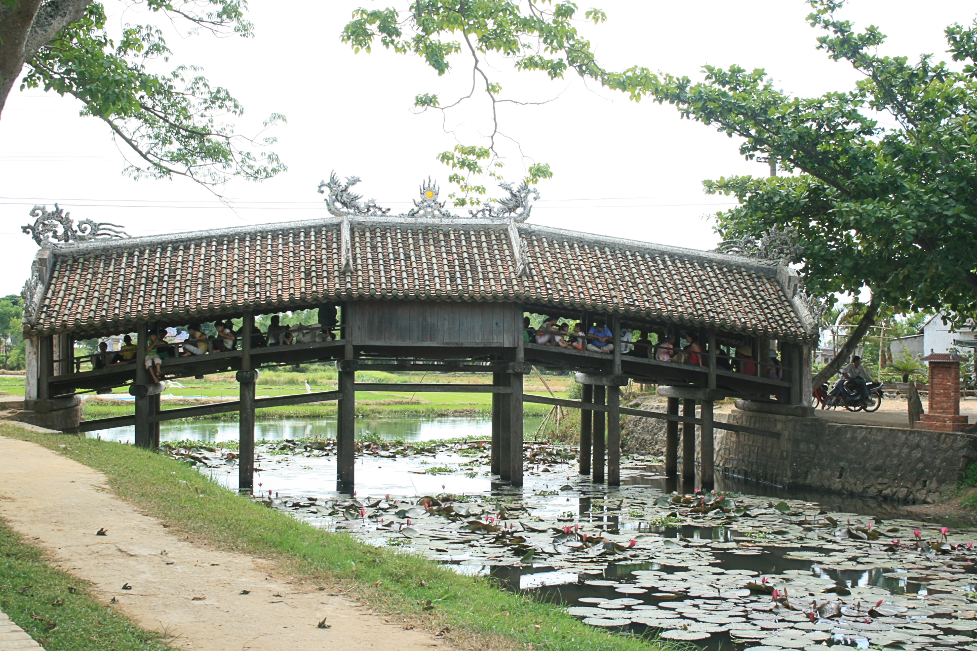 Kiến trúc Cầu ngói Thanh Toàn.